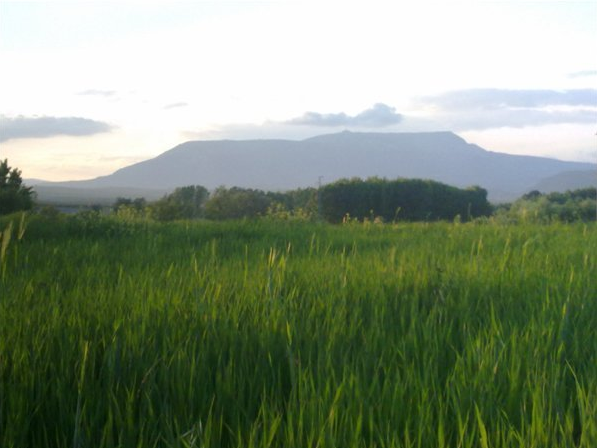 Vista de la Sierra de Parapanda desde la antigua vaquería de Puleva de la localidad de Láchar (Granada, España). Recorte de una foto hecha por mí.